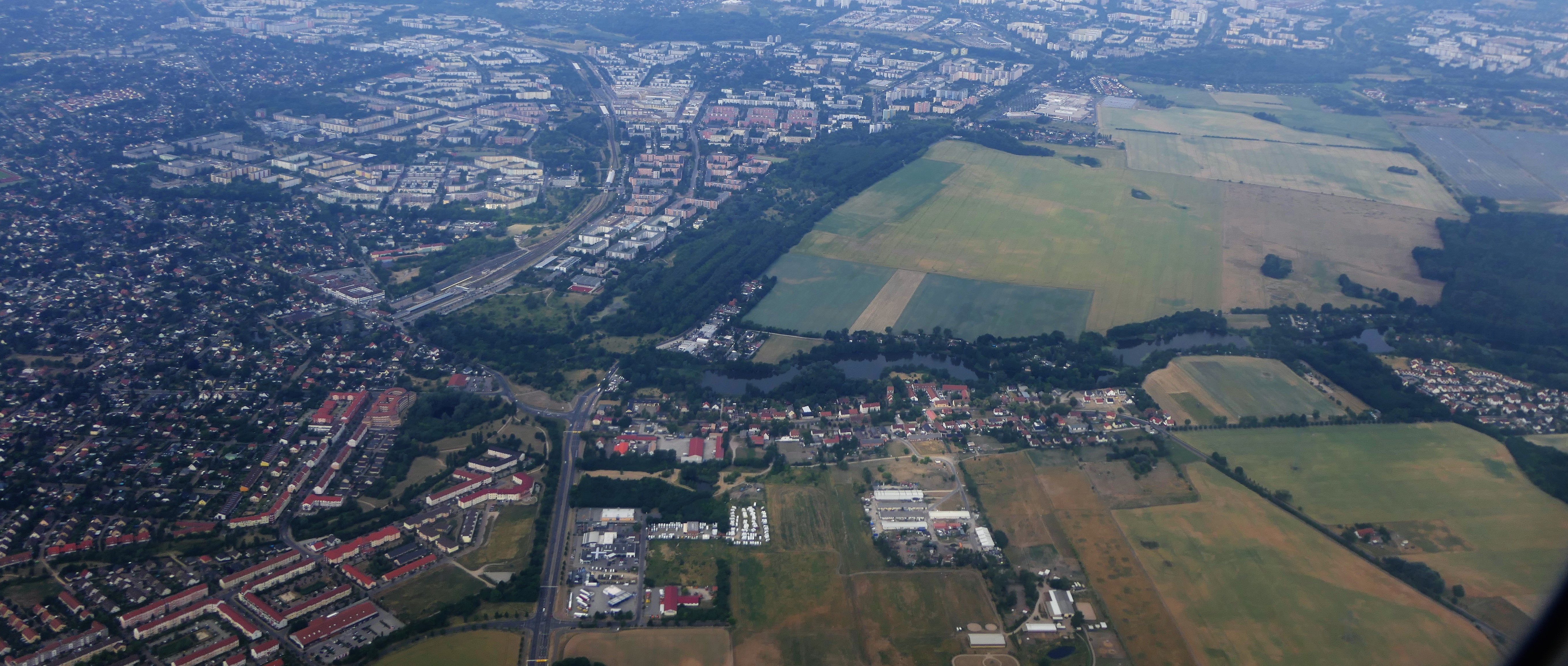 Blick von Osten auf Hönow (Vordergrund), links Hönow-Siedlung, rechts Hönow-Nord, und Hellersdorf (Hintergrund)